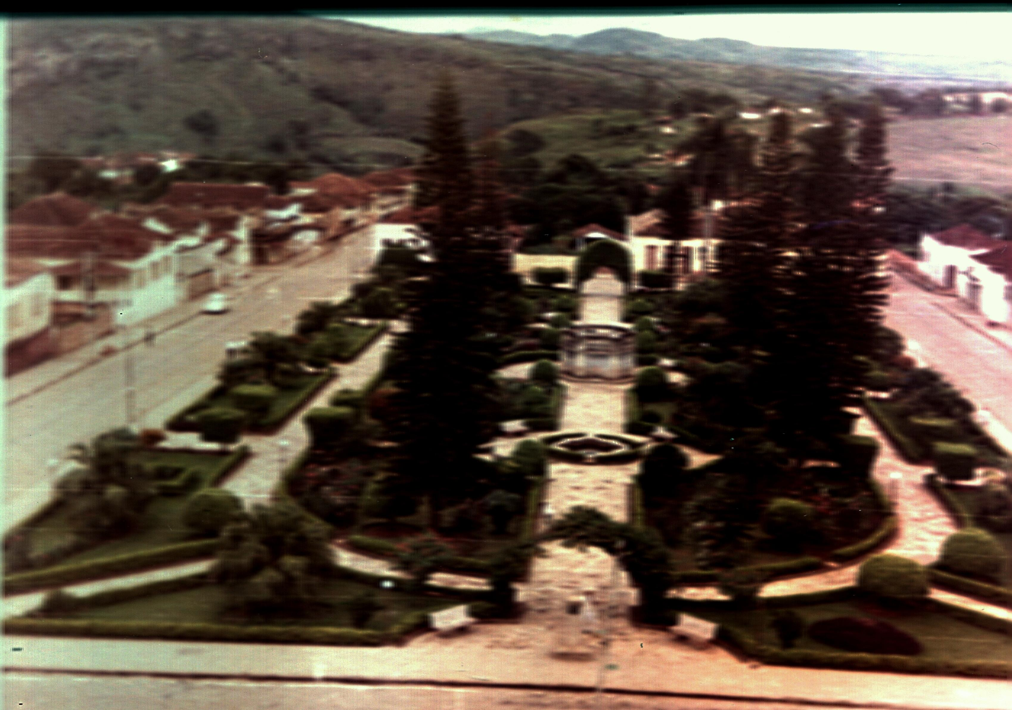 Praça defronte a Igreja Matriz de Alpinópolis em 07 de setembro de 1967. Atualmente esta praça está toda modificada.